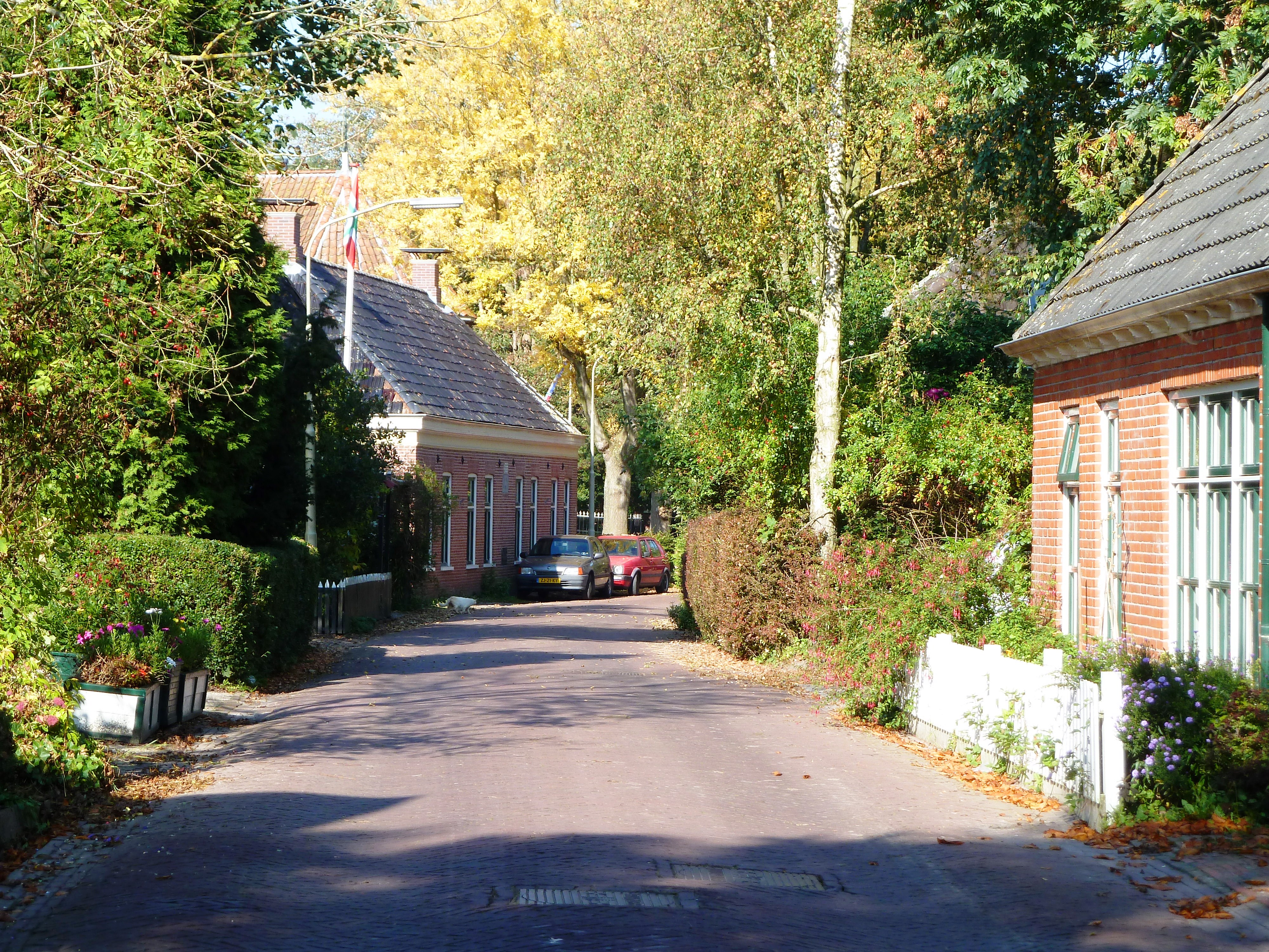 Gezicht op een deel van de Dorpstraat van Oosterwijtwerd (Groningen, Nederland).